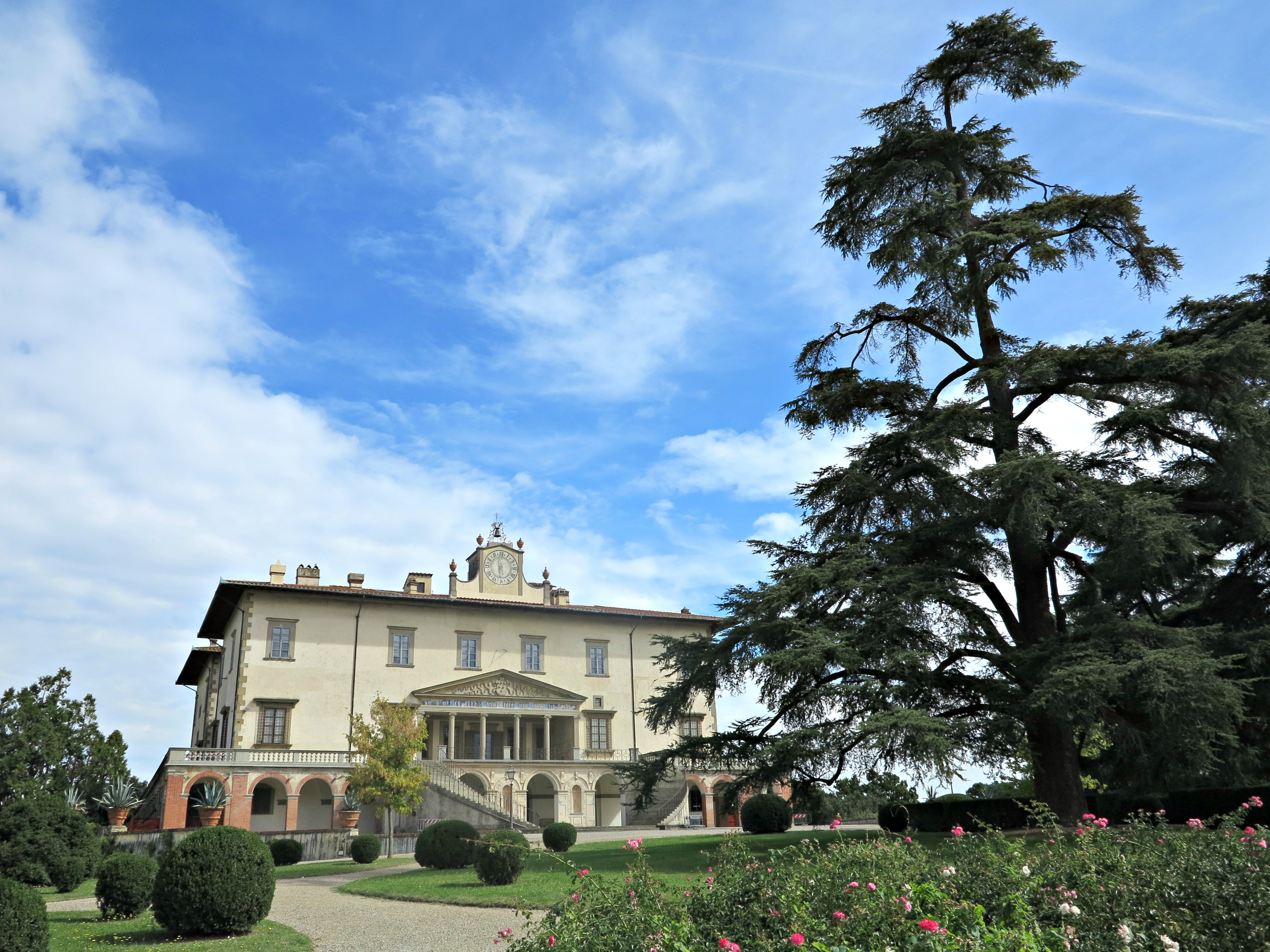 Villa medicea di Poggio a Caiano - MIBAC This is a photo of a monument which is part of cultural heritage of Italy.